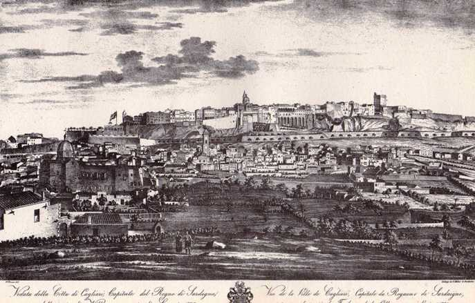 "Veduta della città di Cagliari, capitale del Regno di Sardegna, della parte di Villa Nouva, ossia di Levante, 1825" Litografia di F.E. Werner , stampa di C.F.Müller [1].